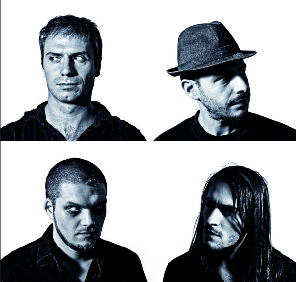 phidge